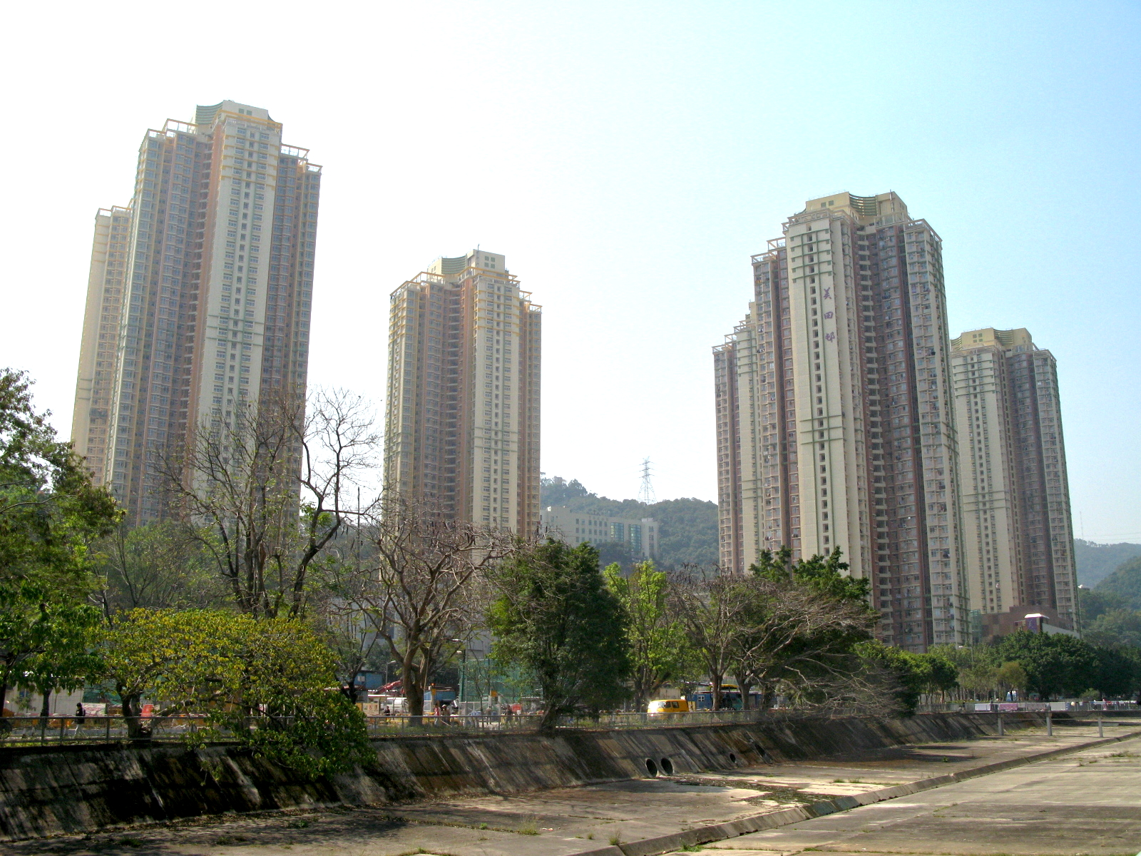 HK Mei Tin Estate